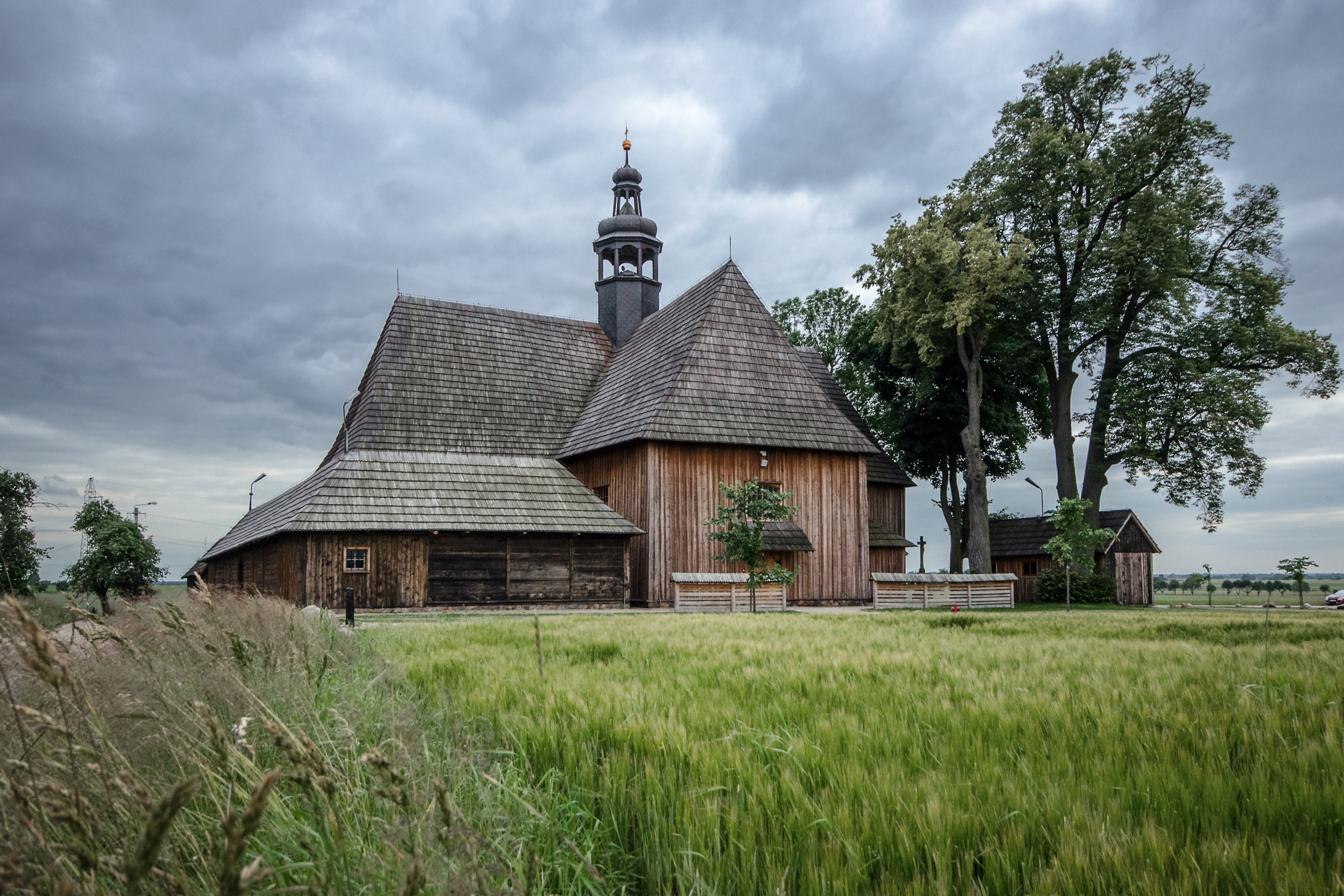 Bralin, kościół odpustowy p.w. Narodzenia NMP, tzw. Na Pólku, 1711